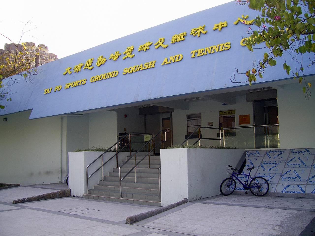 大埔運動場壁球及網球中心